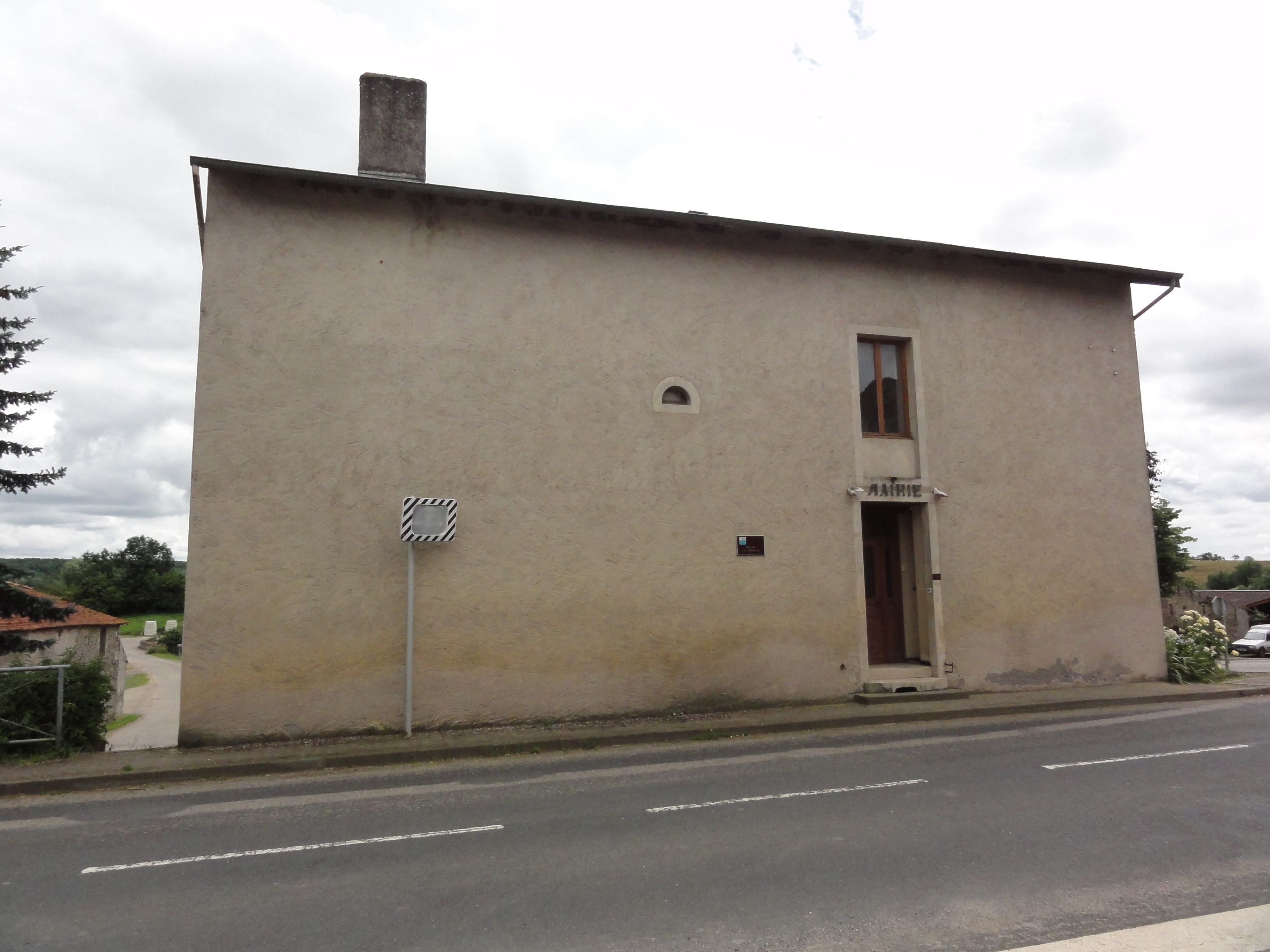 Crantenoy (M-et-M) plaque Michelin